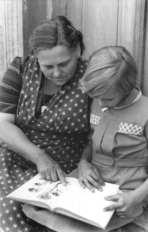 LPG Güsen, Vorsitzende der LPG mit Kind Zentralbild Biscan 11.8.1953 Produktionsgenossenschafts-Bäuerin als Delegierte zum Parteitag der DBD Zu den vielen Bäuerinnen, die zu dem demnächst stattfindenden III. Parteitag der Demokratischen Bauernpartei Deutschlands in Güstrow delegiert wurden, gehört auch die Bäuerin Gertrud Stelle aus Güsen bei Magdeburg, die sich als Vorsitzender der Produktionsgenossenschaft "Seid bereit", sowie als Abeordnete des Bezirkstages und erste Kreisvorsitzende der DBD in Genthin sehr bewährt hat. UBz: Trotz der vielen Besprechungen, Sitzungen, Konferenzen findet die Genossenschaftsbäuerin Gertrud Stelle auch noch Zeit, sich um ihre drei Kinder zu kümmern. Gunde, die älteste, hat ein sehr gutes Zeugnis nach Hause gebracht. Sie will einmal Gärtnerin werden und lässt sich hier von Mutti eine Pflanze erklären.